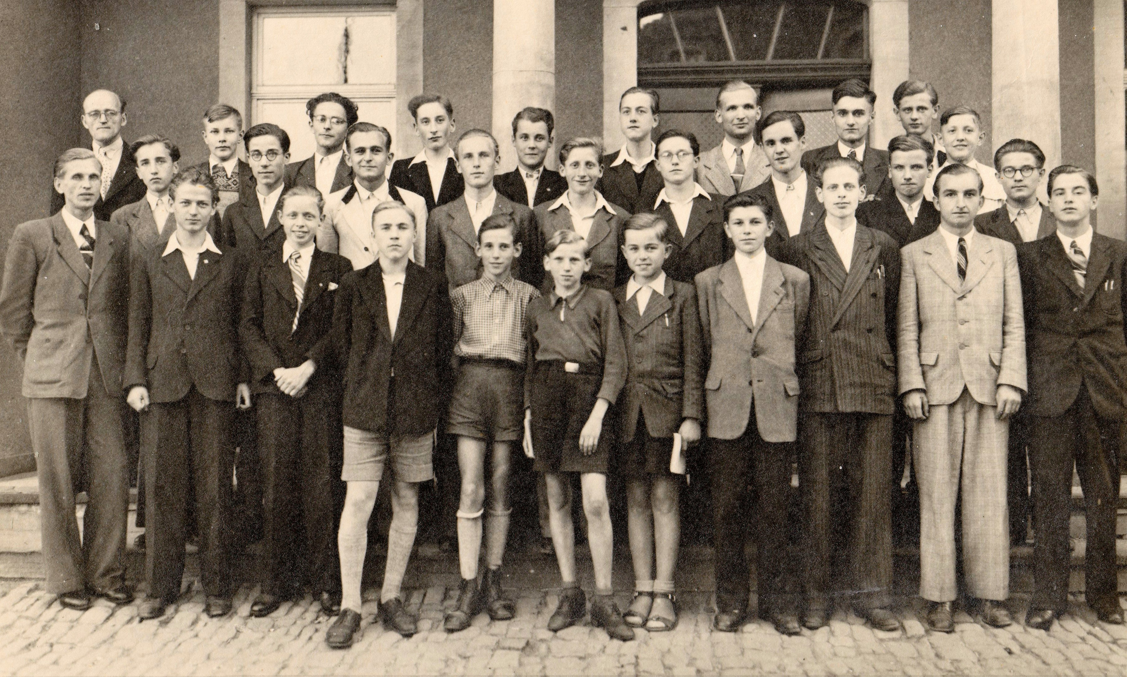 Grupenbild zur deutschen Schach-Jugendmeisterschaft 1949 der Ostzone (23. Juli bis 7. August 1949 in Bad Klosterlausnitz). Von links nach rechts: Kurt Rogler (Turnierleiter), Bruno Ullrich (Der Schachspiegel), Hartmut Kauder, Klaus Kunze, Hubert Walkewitz, Gerhard Hund, Wolfgang Dick, Manfred Kahn, Helmut Heß, Rüdiger Mainz, Wilfried Pflughaupt, Hans Geffke, Wolfgang Paris, Werner Breustedt, Harry Otto, Lothar Kleine, Karl-Heinz Hartung, Reinhard Fuchs, Karl-Heinz Christoph, Edwin Oldekop, Heinz Weckel, Helge Kildal, Konrad Hoffmann, Siegfried Rühlemann, Klaus-Günter Leyendecker, Werner Remmer, Eberhard Lautenschläger, Detlef Hörner, Siegfried Brüchner, Helmut Linke.